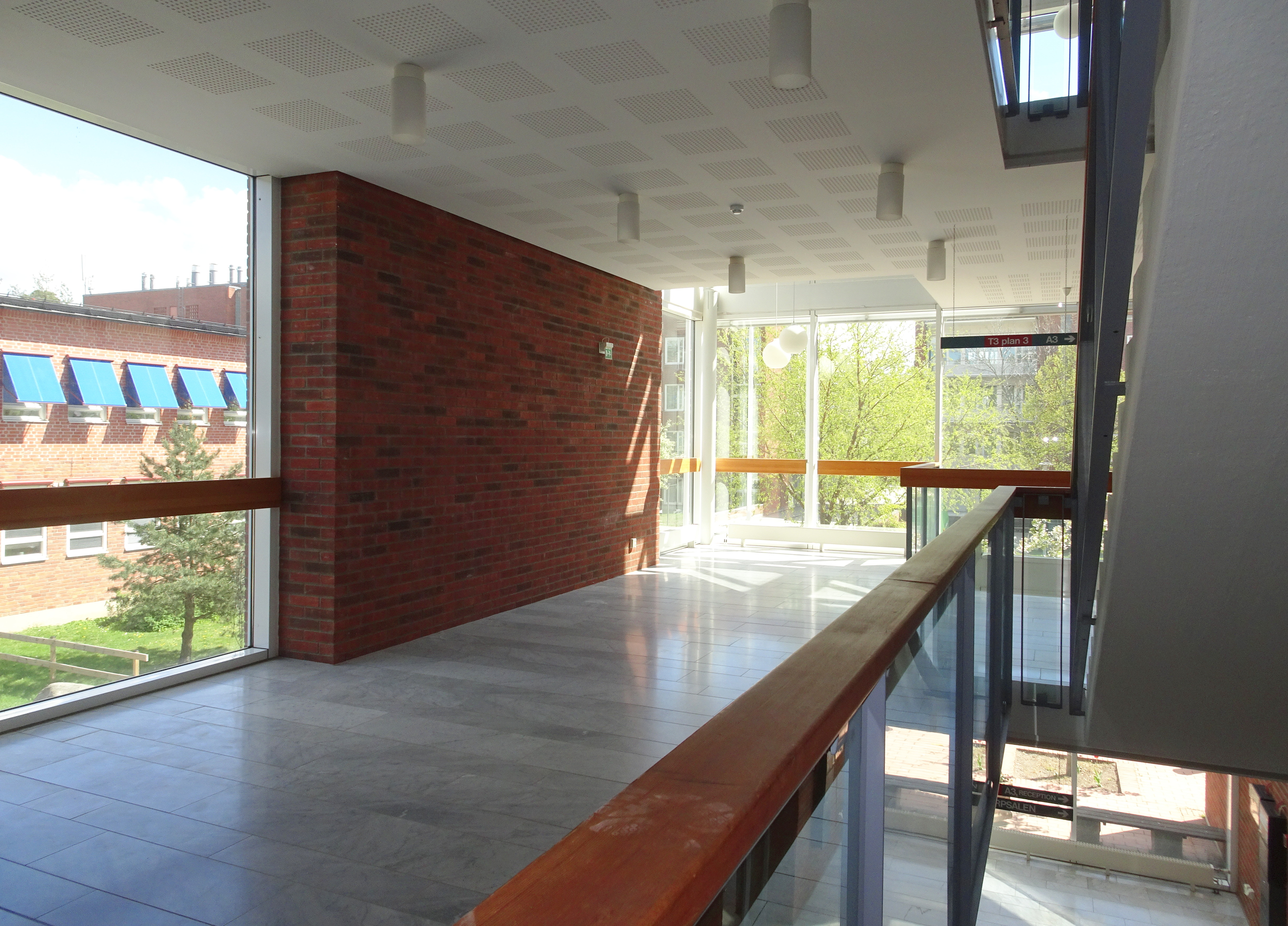 Retziuslaboratoriet, trapphall